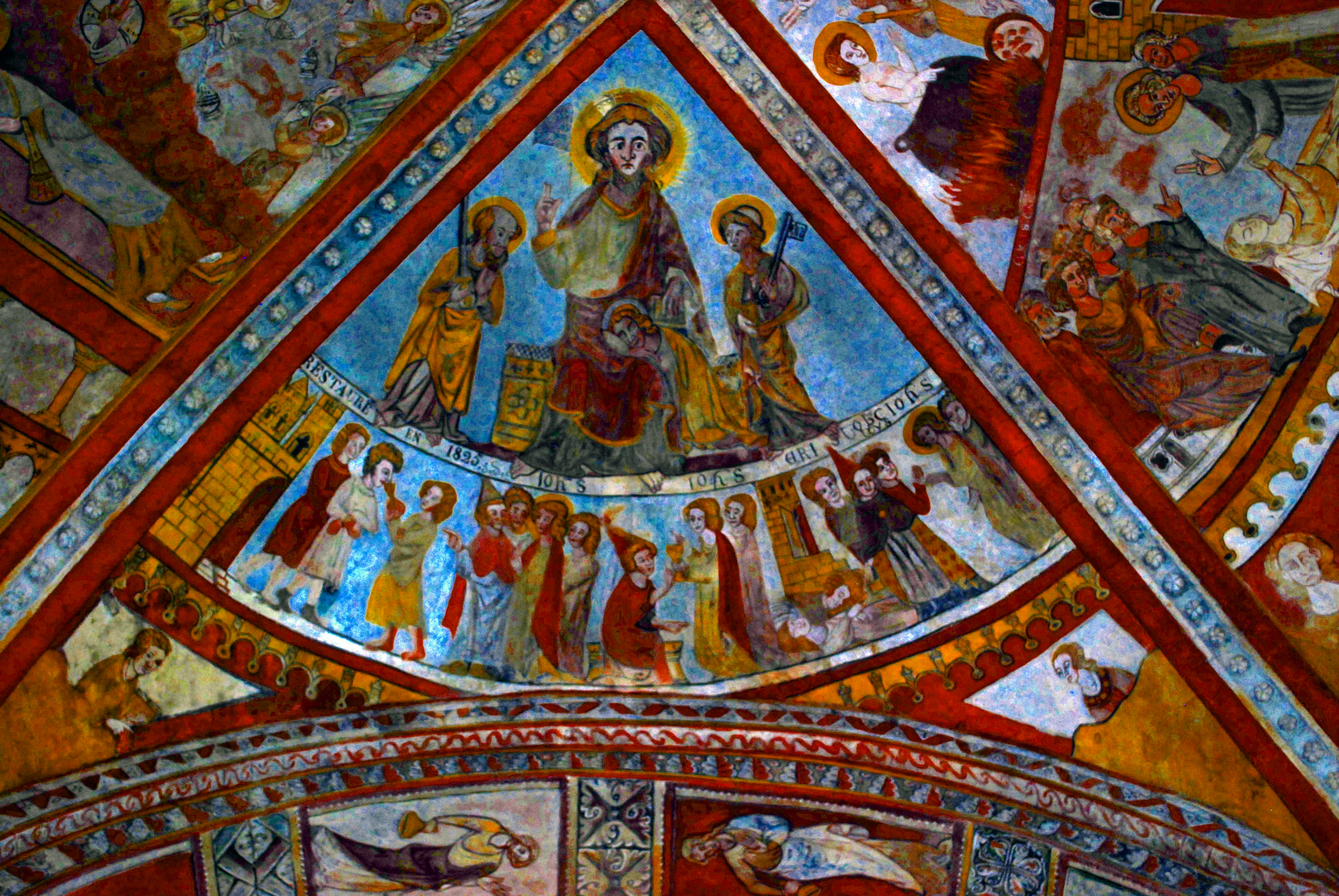 Saint-Macaire église peintures gothiques